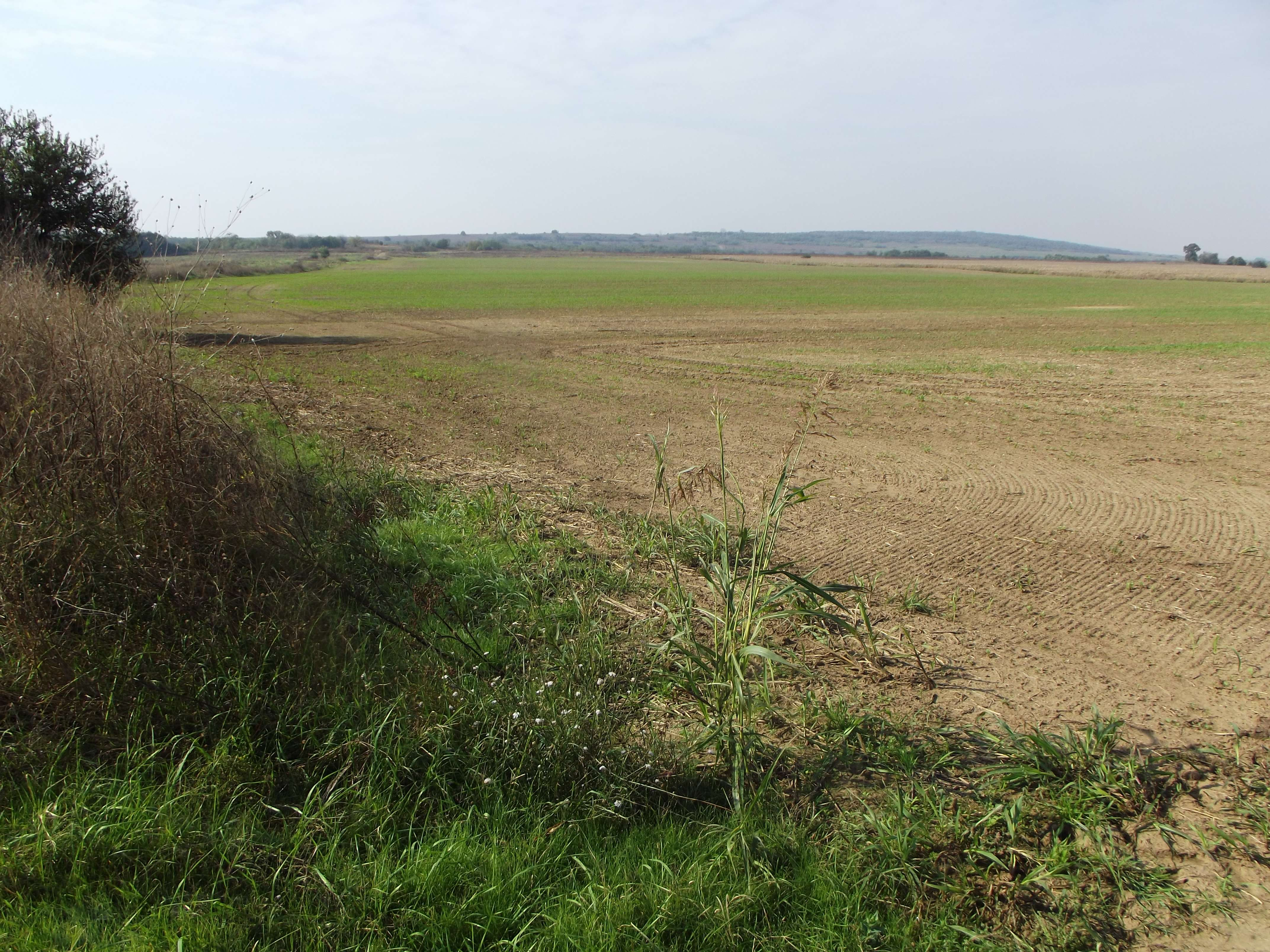 Поле в местността Път горунски в Ново село, Видинско